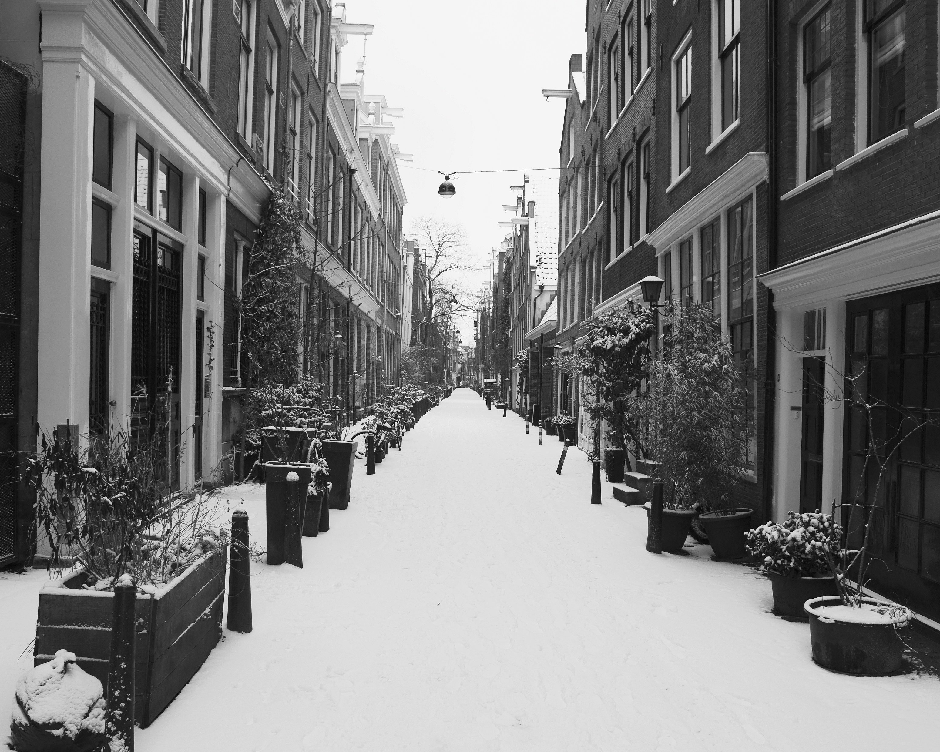 Maagdelijk wit, zondag ochtend sneeuw in de Jordaan. sunday morning snow.